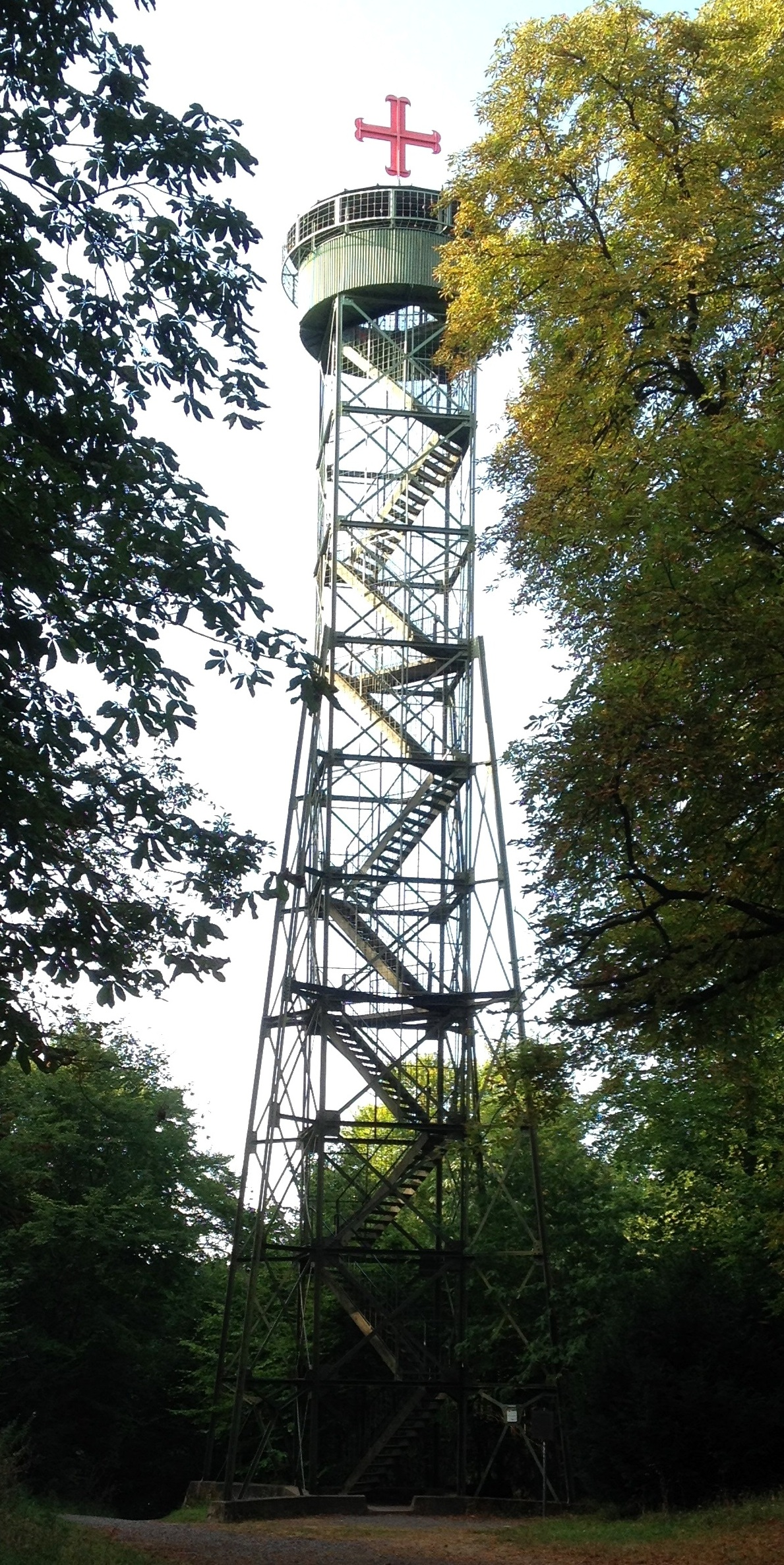 Bad Pyrmont, Spelunkenturm